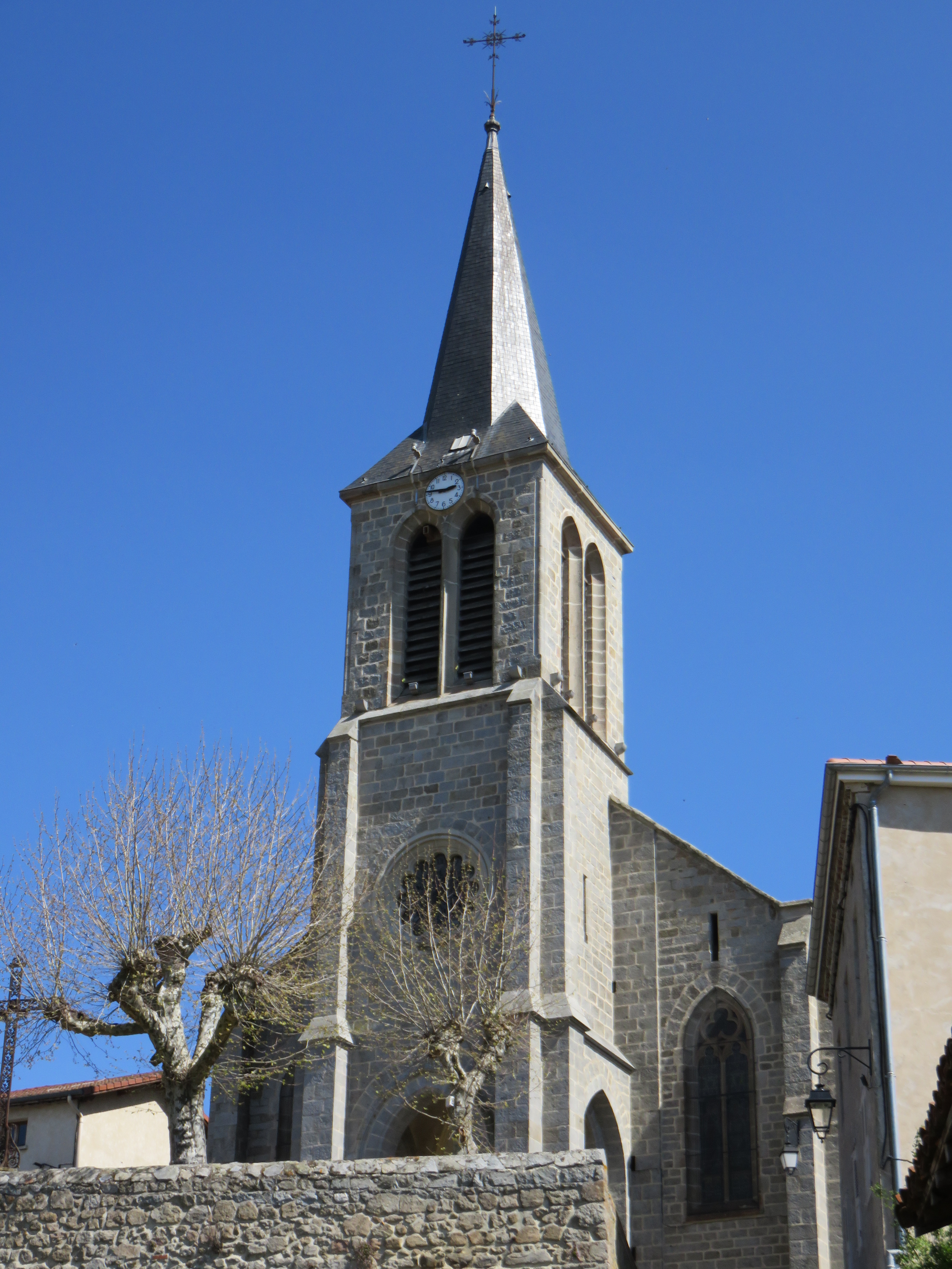 Clocher de l'église Saint-Cyr-et-Sainte-Julitte de Saint-Cyr-les-Vignes (Loire, France).